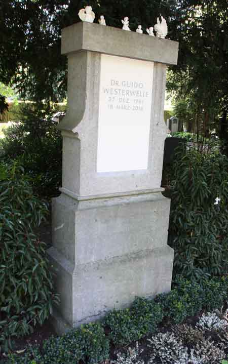 Das Grab von Guido Westerwelle.